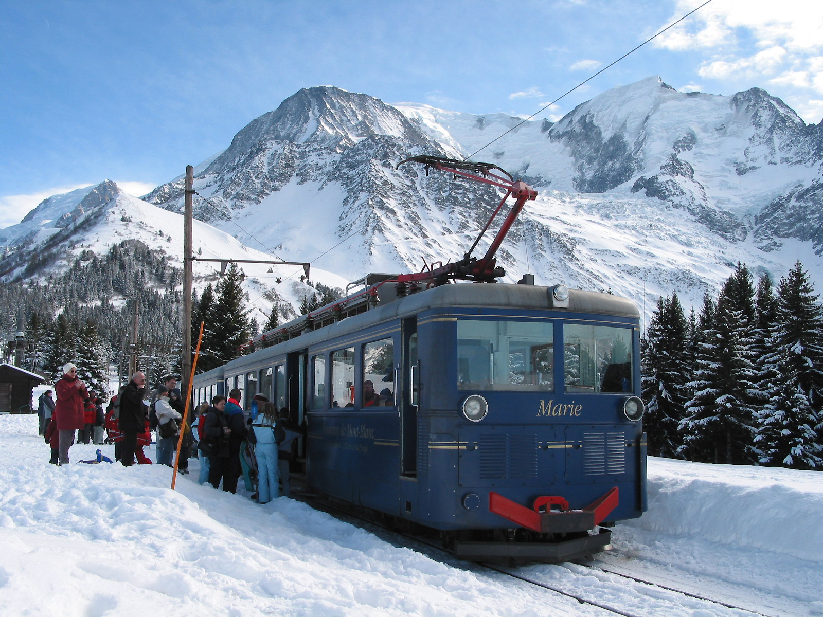 Saint-Gervais-les-Bains (Haute-Savoie - France), le Tramway du Mont-Blanc à l'arrêt en gare de Bellevue (1794 m).